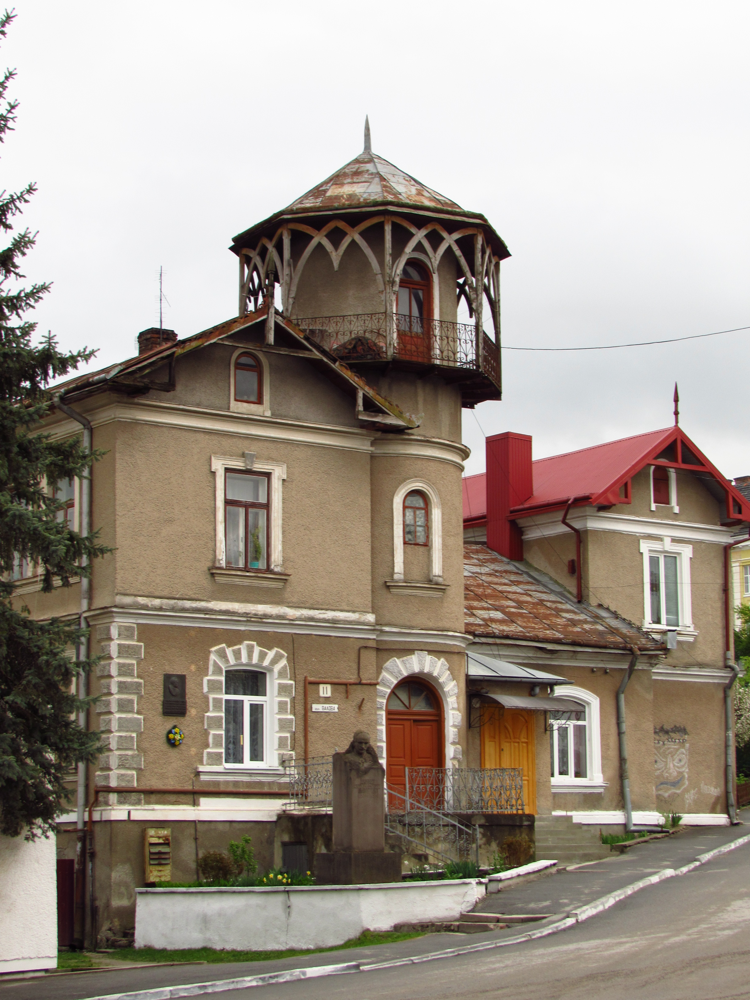 Житловий будинок, у якому жив письменник Андрій Якович Чайковський та бував письменник Іван Якович Франко (мур.), Бережани, вул. Валова, 11